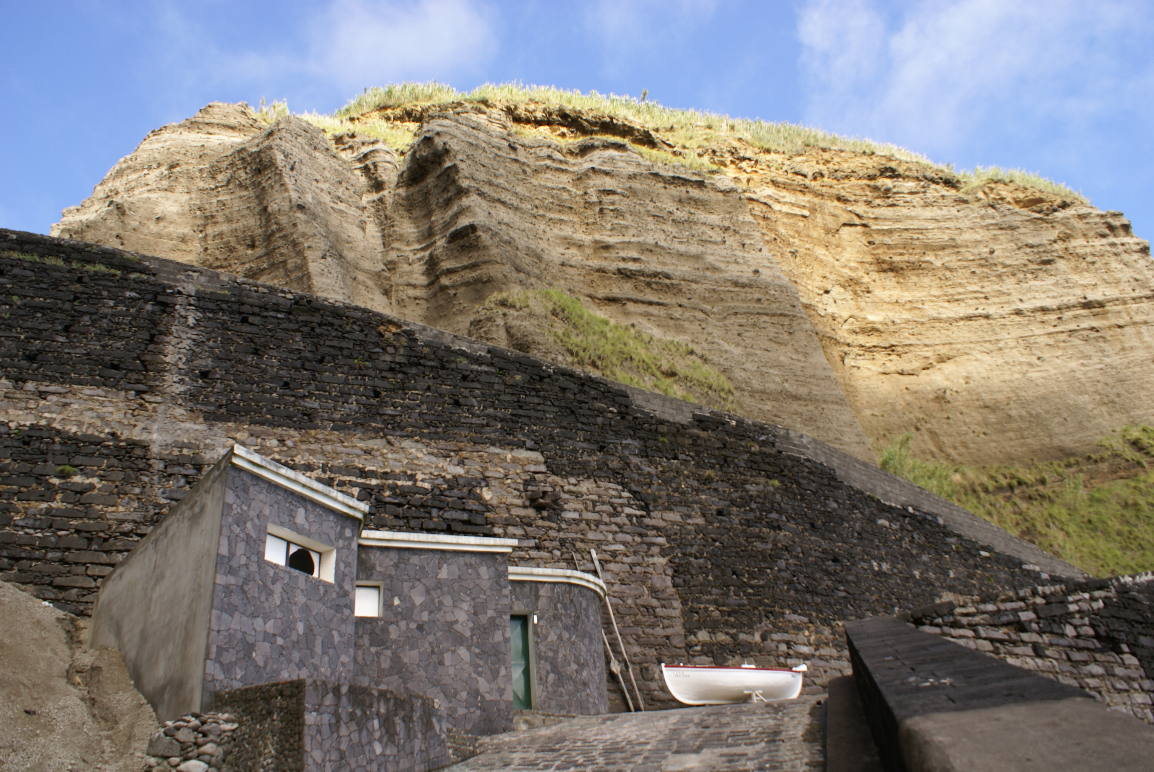 Falésias junto ao Porto da Ribeirinha, Ribeira Grande, ilha de São Miguel, Açores